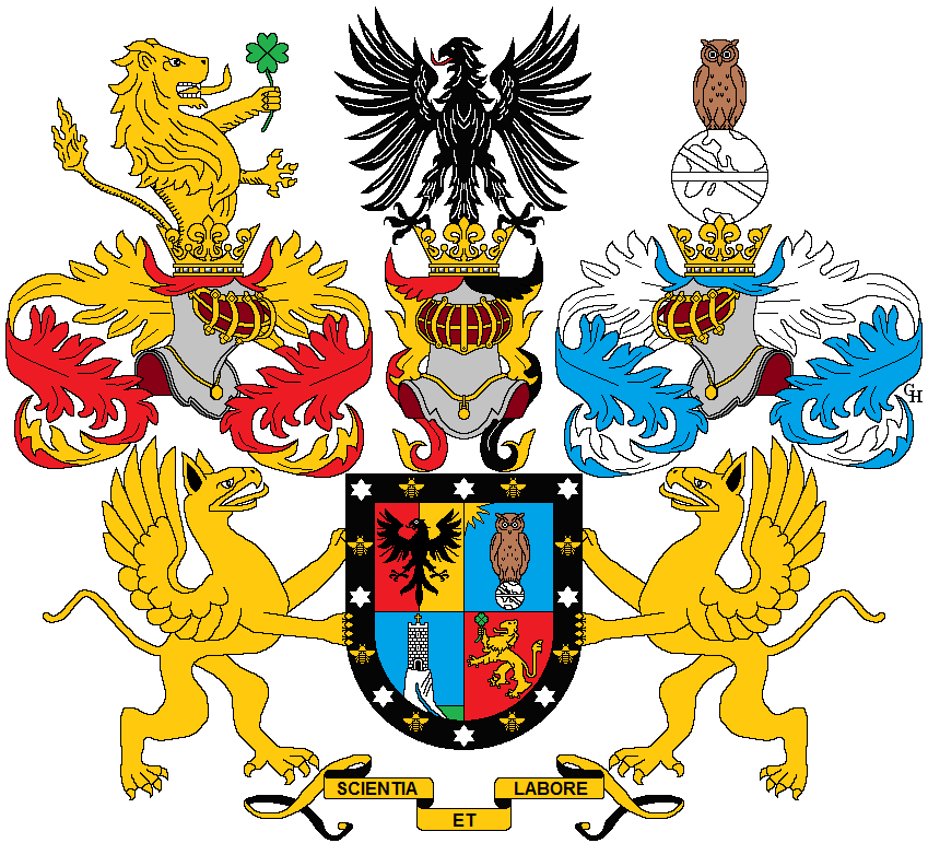 Wappen des Wirtschaftsfachmanns, Volksbildners und Diplomaten Wilhelm Ritter von Schwarz-Senborn (1816–1903), verliehen anlässlich seiner Erhebung in den österreichischen Freiherrenstand 1869. Zeichnung von Gerd Hruška ( Für weitere Informationen zu dieser Standeserhebung siehe (